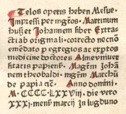 Mesue, 1478 Lyon, colophon